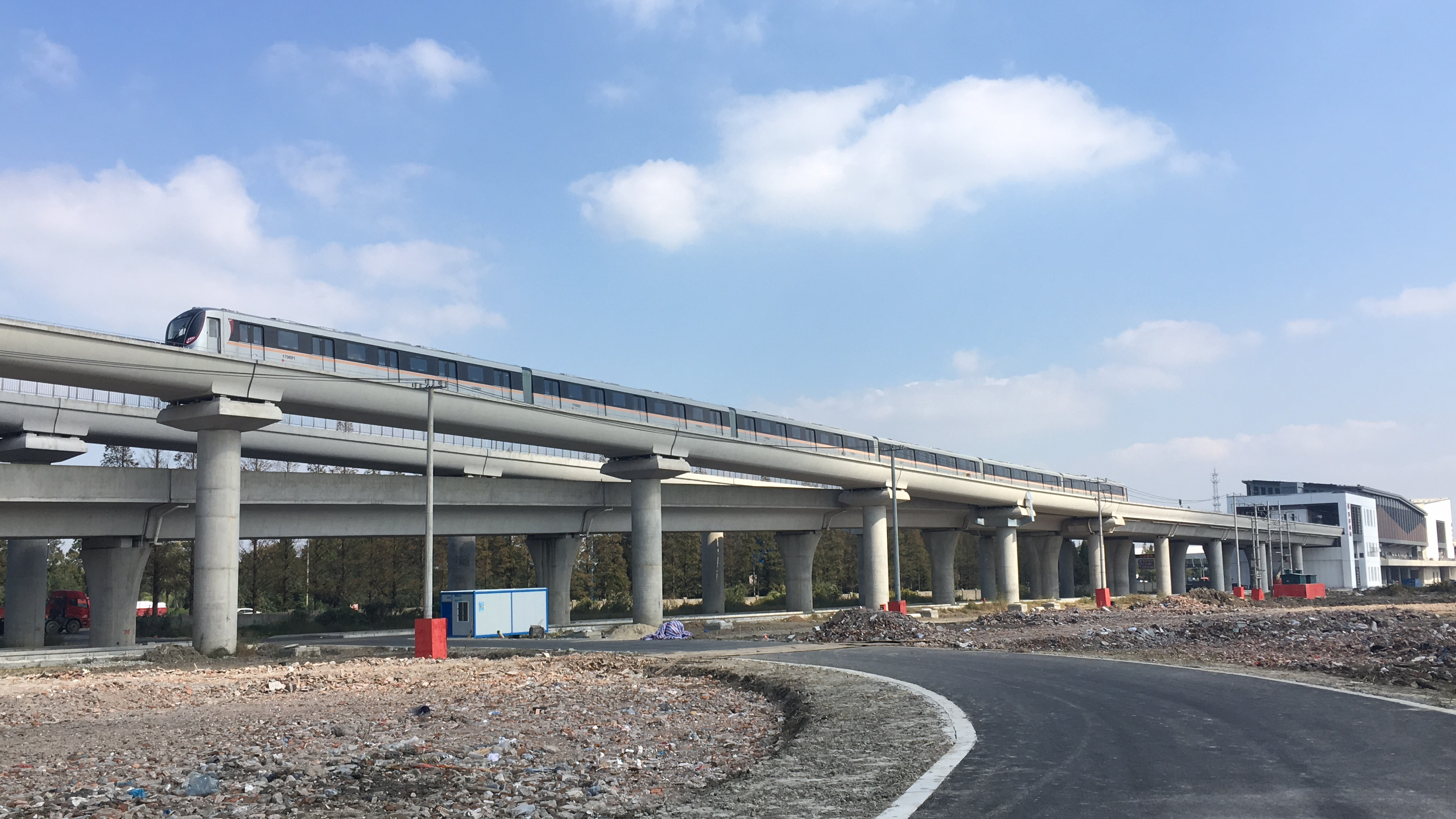 行驶在高架段的上海地铁17号线列车